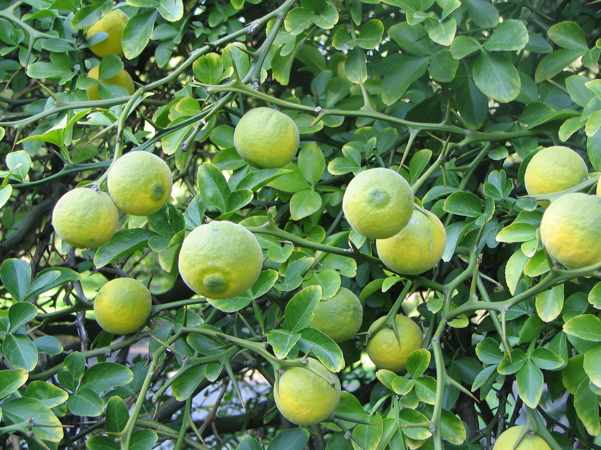 Poncirus trifoliatus, Botanicka zahrada, Bratislava (autor: Mihailo Grbic, Sept.22,2006)